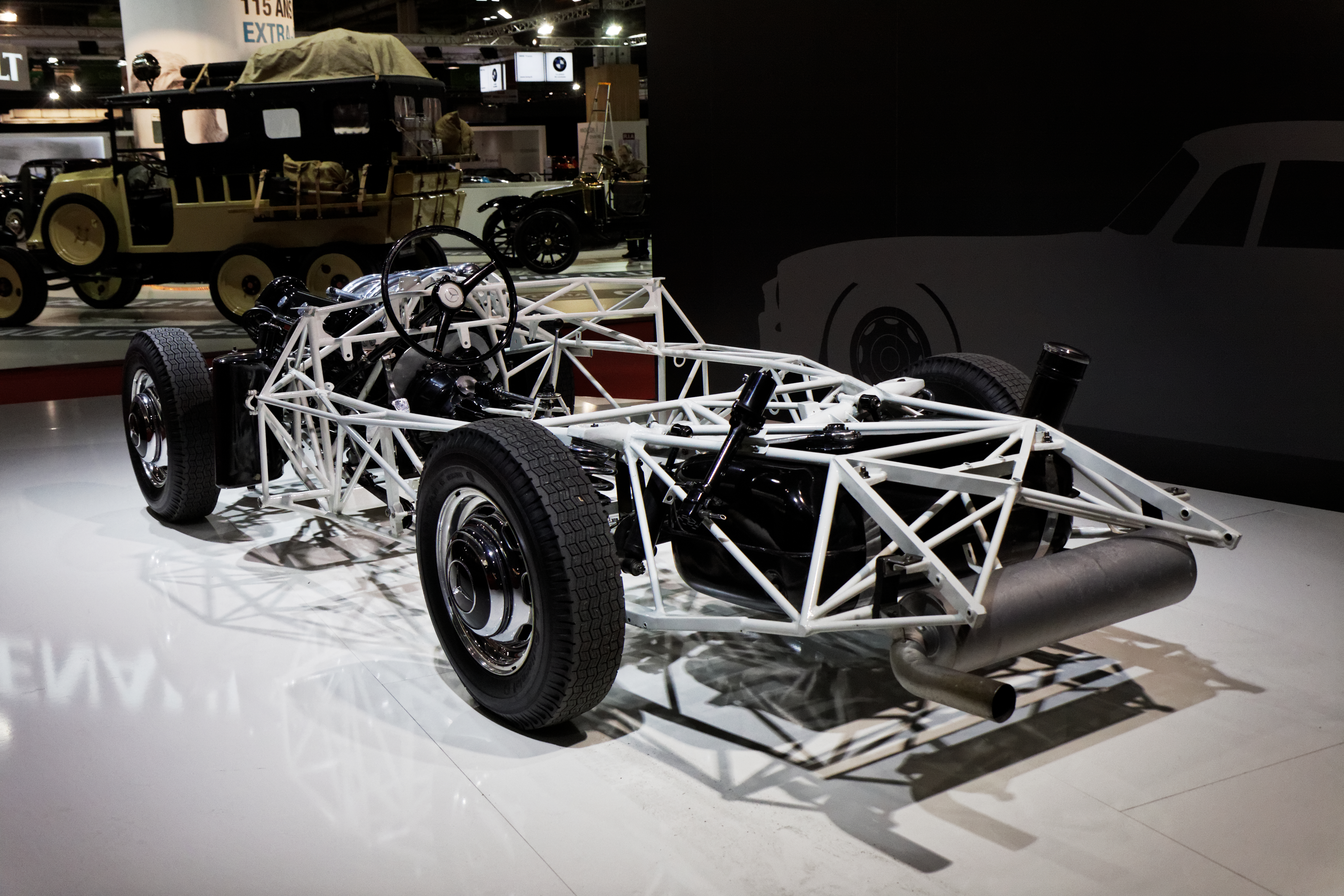 Le chassis d'une Mercedes-Benz 300 SL coupé présentée lors du salon retromobile 2013.